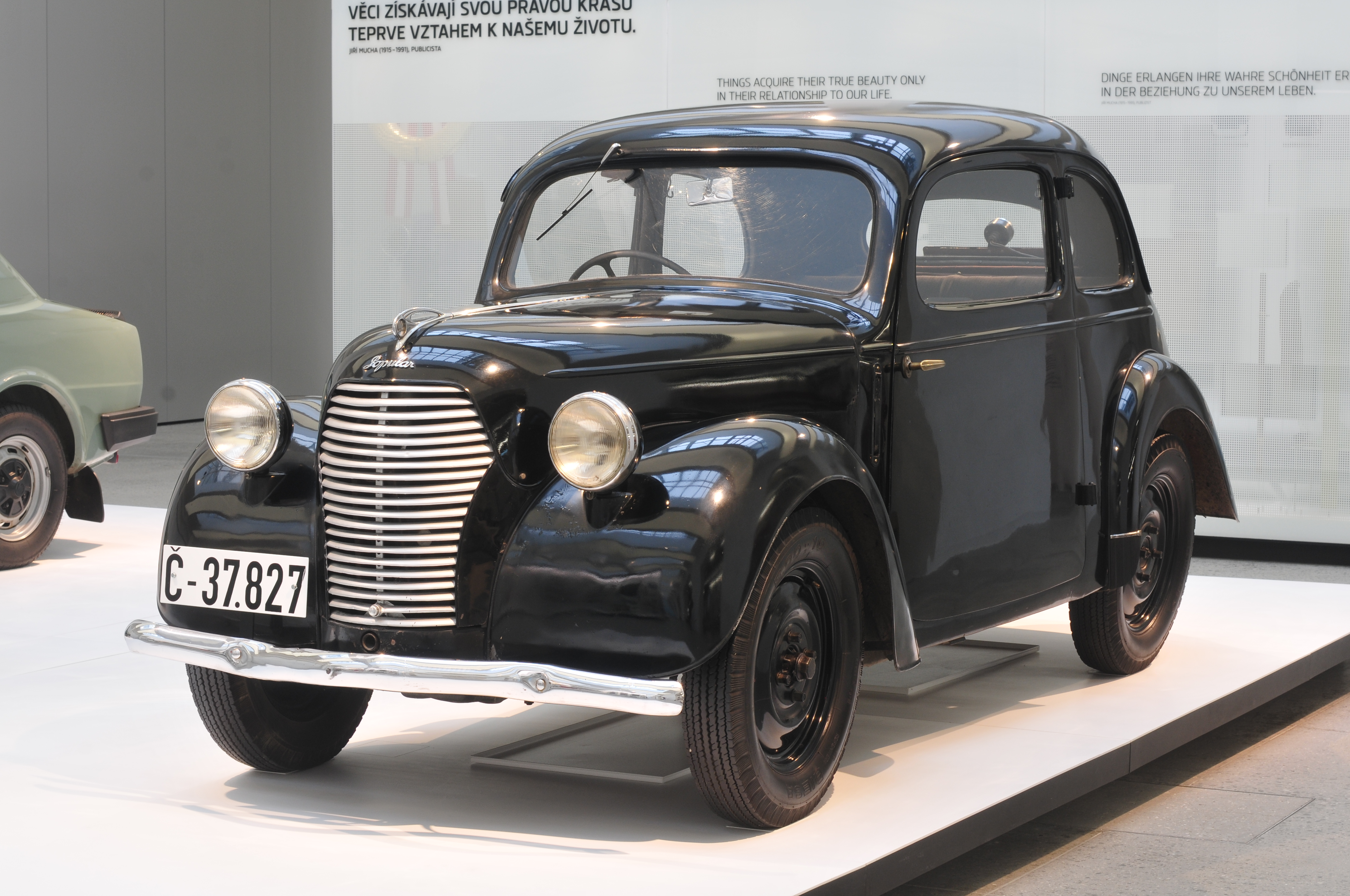 Fototermin Škoda Museum Mladá Boleslav 2013 Fototermin Škoda Muzeum 5. April 2013 in Mladá Boleslav This work is free and may be used by anyone for any purpose. If you wish to use this content, you do not need to request permission as long as you follow any licensing requirements mentioned on this page.